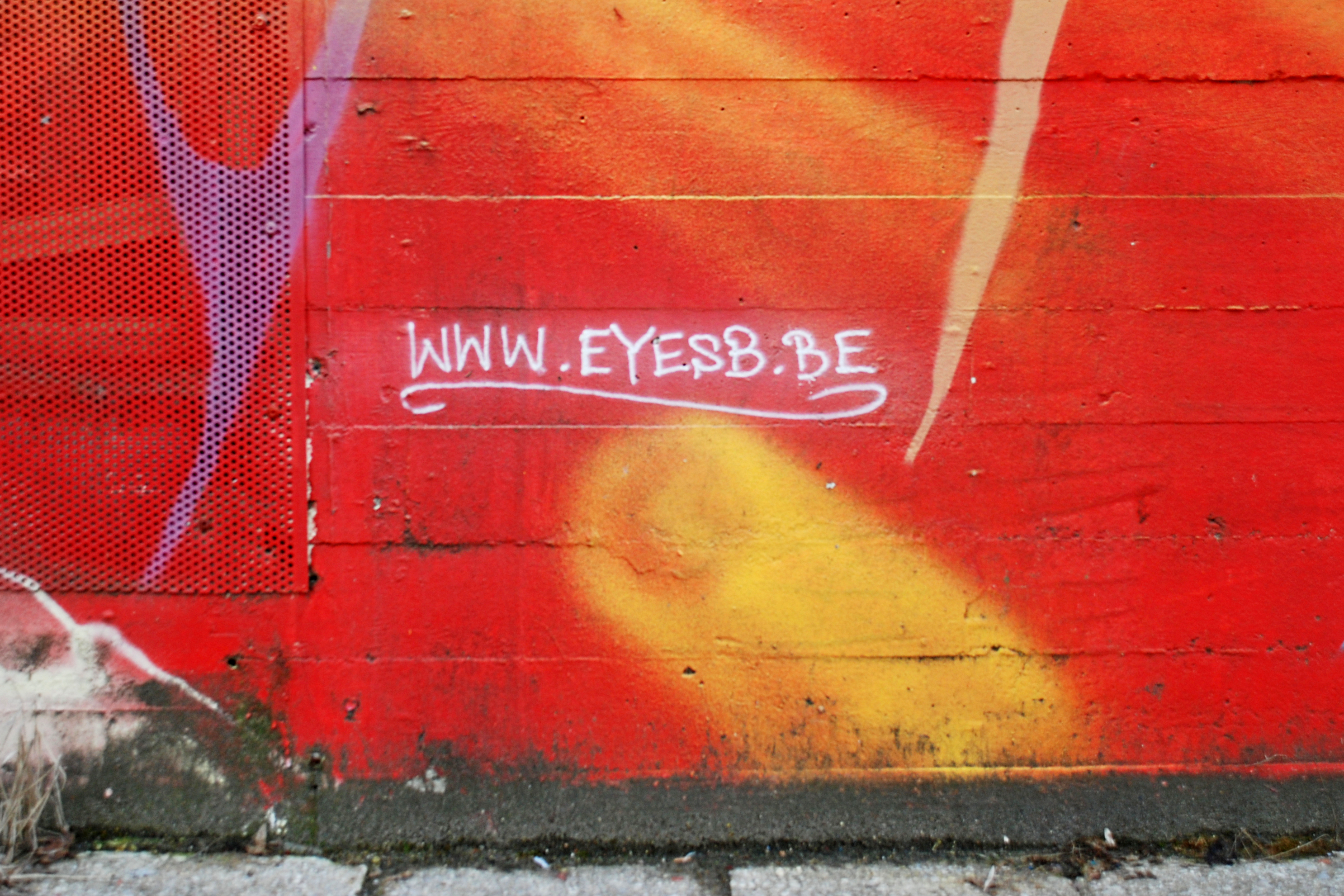 Belgique - Louvain-la-Neuve - Gare - Escalier 2 - Fresque de Eyes-b (Kosmopolite Art Tour 2015 à Louvain-la-Neuve)